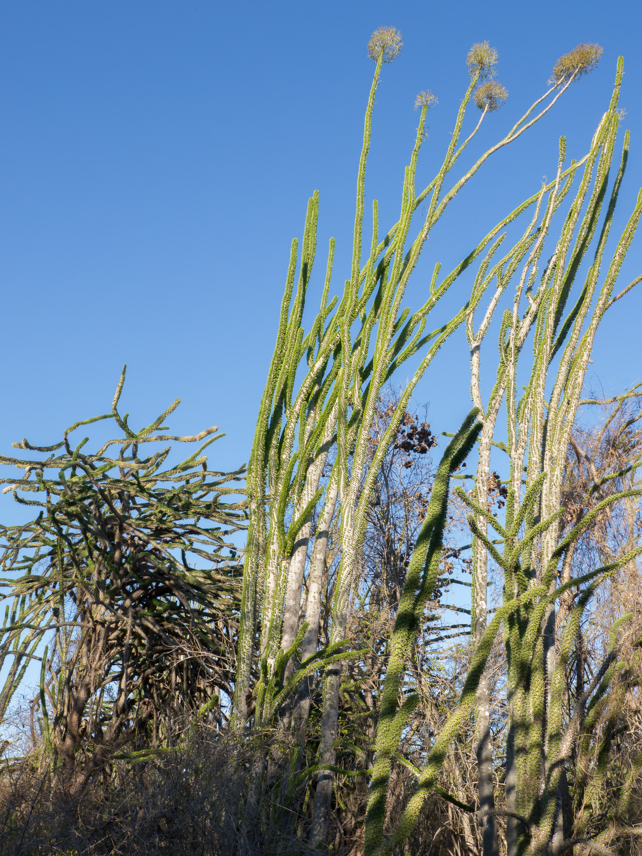 Didiera trollii und Alluaudia ascendens mit Blüten. Berenty-Schutzgebiet, Madagaskar.